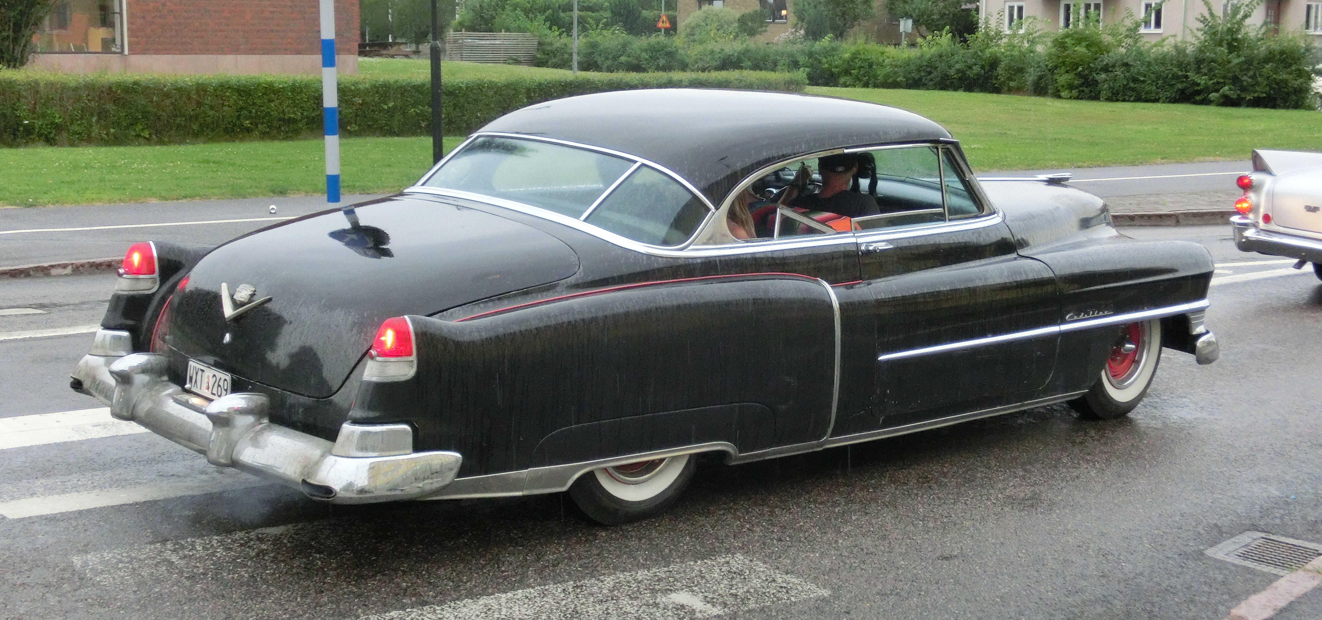 En svart Cadillac Coupe de Ville av årsmodell 1952 på cruising i Falköping 2014-07-26. Bilen kör på Sankt Sigfridsgatan i Falköping, Västergötland, Västra Götalands län, Sverige.